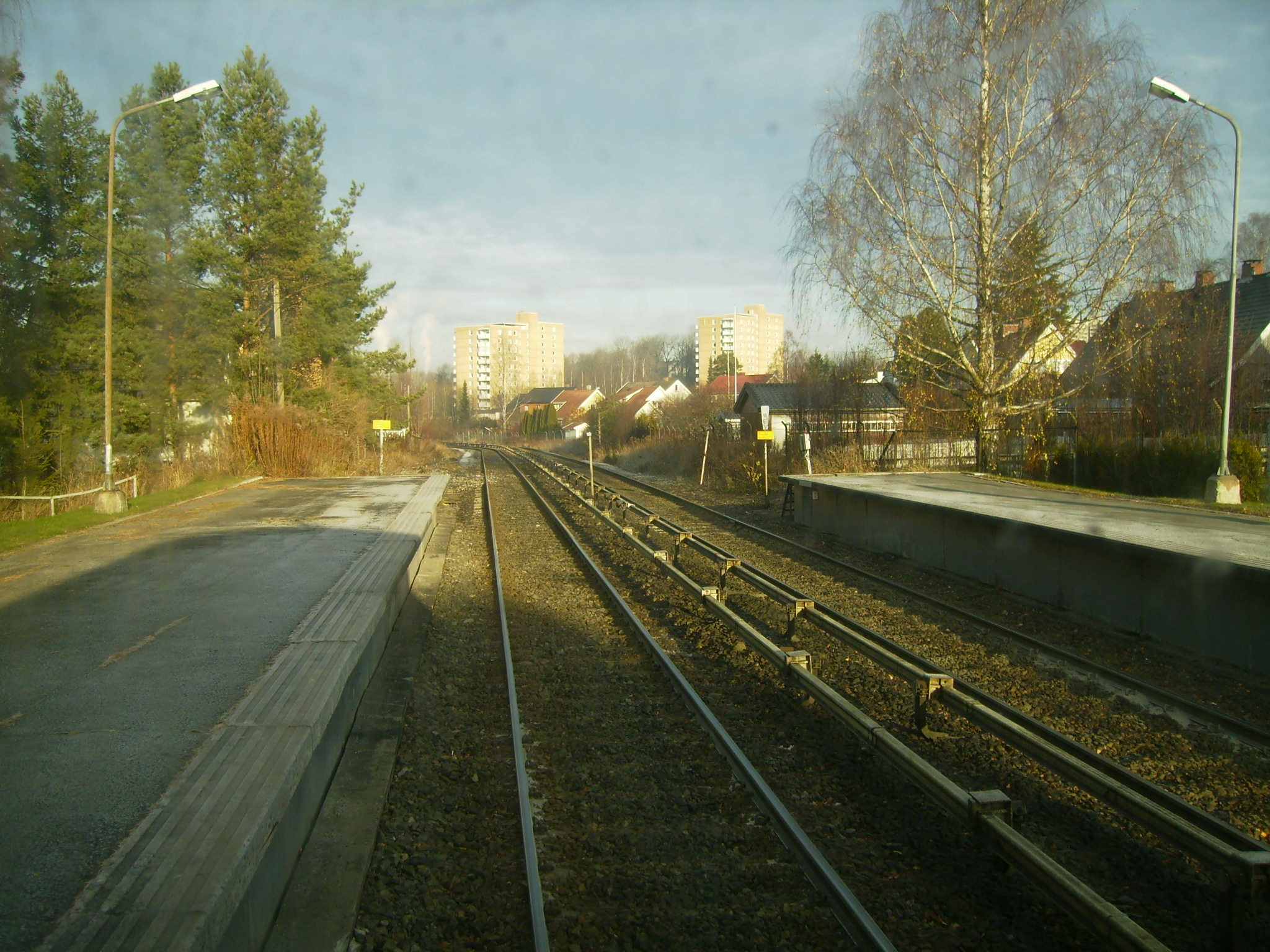 Godlia stasjon nordover sett innenfra et Tx-tog. Hellerud metro station looking northwards, seen from inside a Tx train.